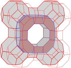 Struktur des Zeolith A mit Darstellung des alpha-Käfigs